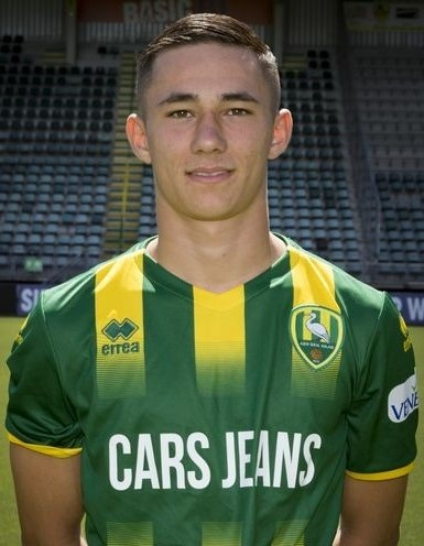 Delano Ladan